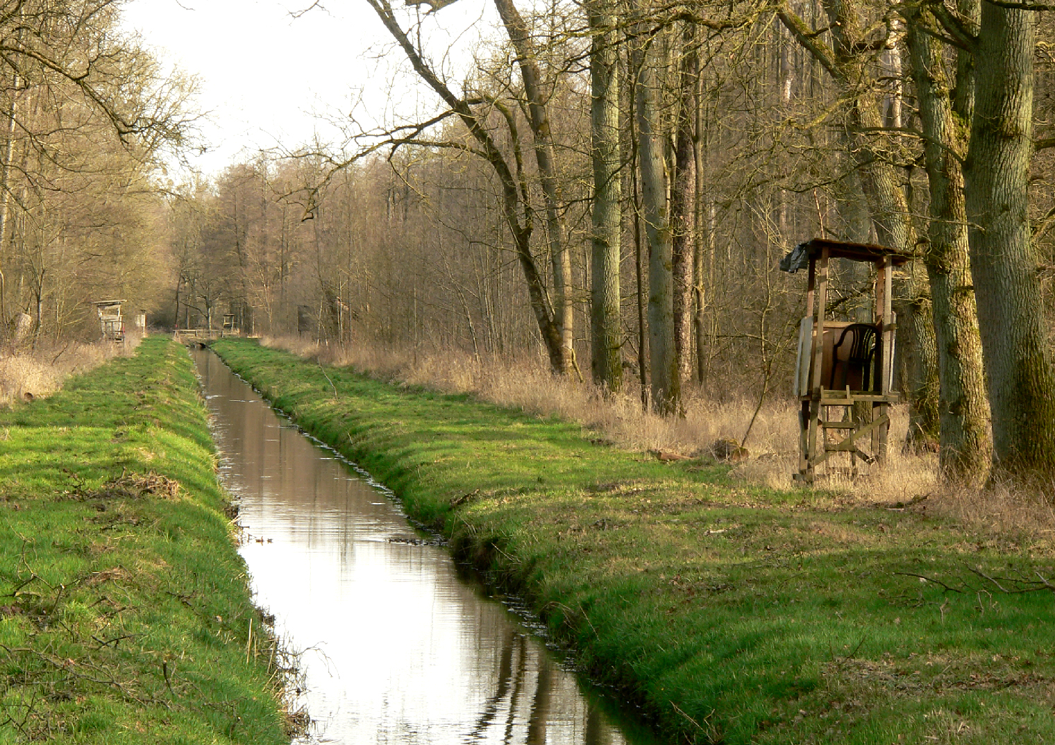 Parsauer Graben im Naturschutzgebiet Nördlicher Drömling